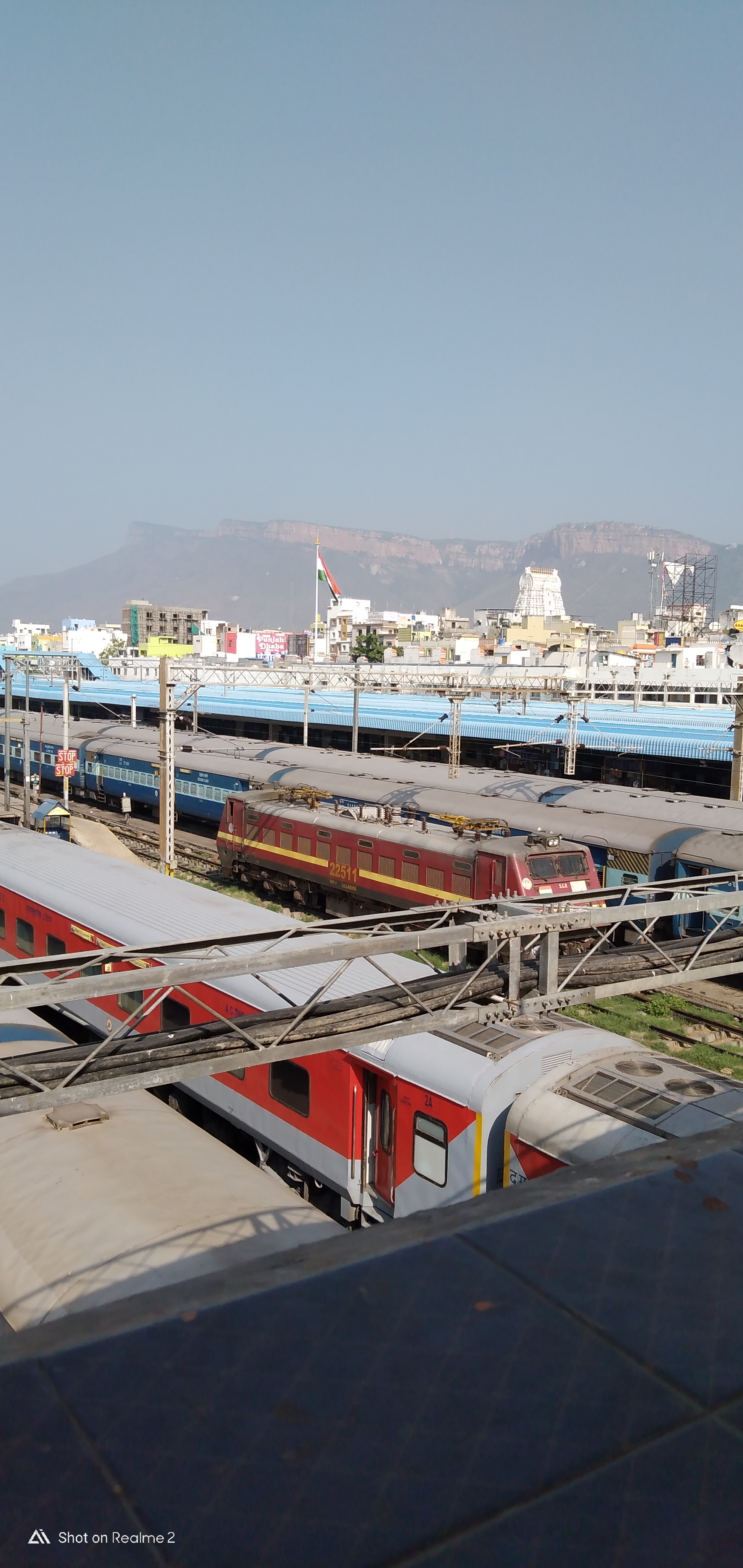 తిరుపతి రైల్వే స్టేషన్